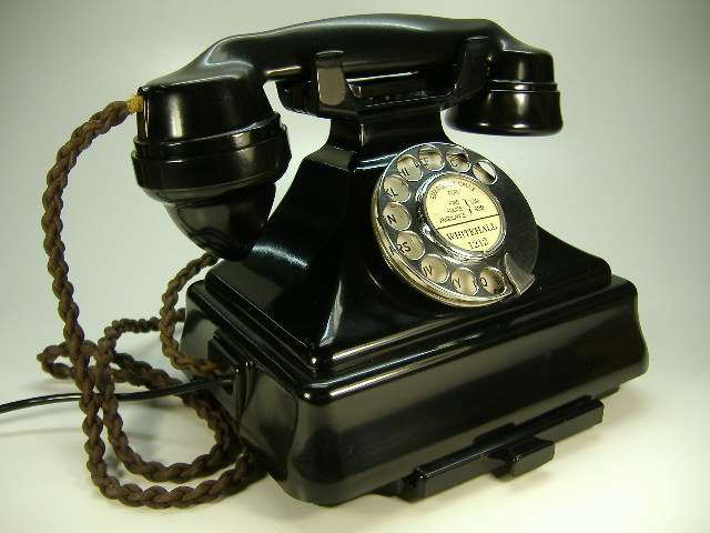 telefon baquelita